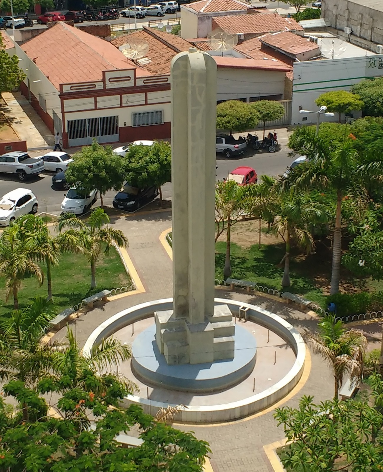 Obelisco da Praça Monsenhor Caminha, no centro de Pau dos Ferros, Rio Grande do Norte (Brasil).